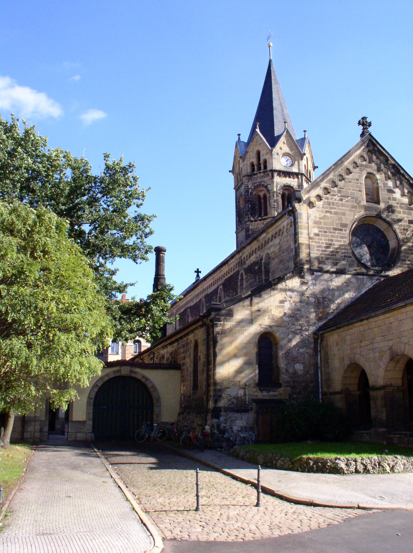 Nikolaikirche Eisenach